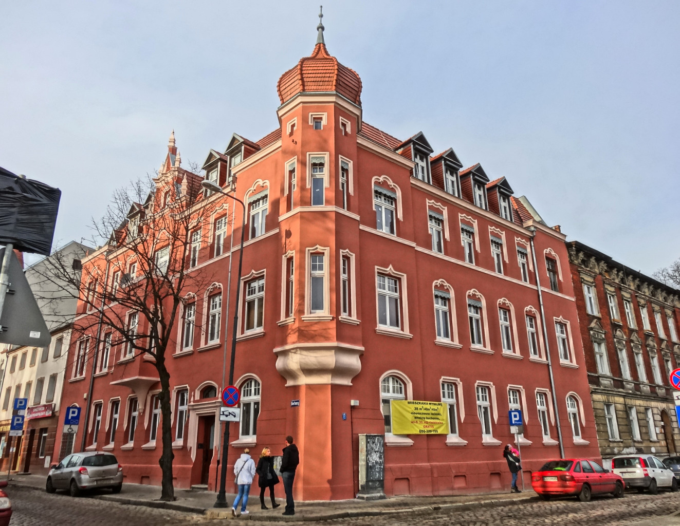 Kamienica ul. Garbary 12 na osiedlu Okole w Bydgoszczy (secesja, 1904-1905)